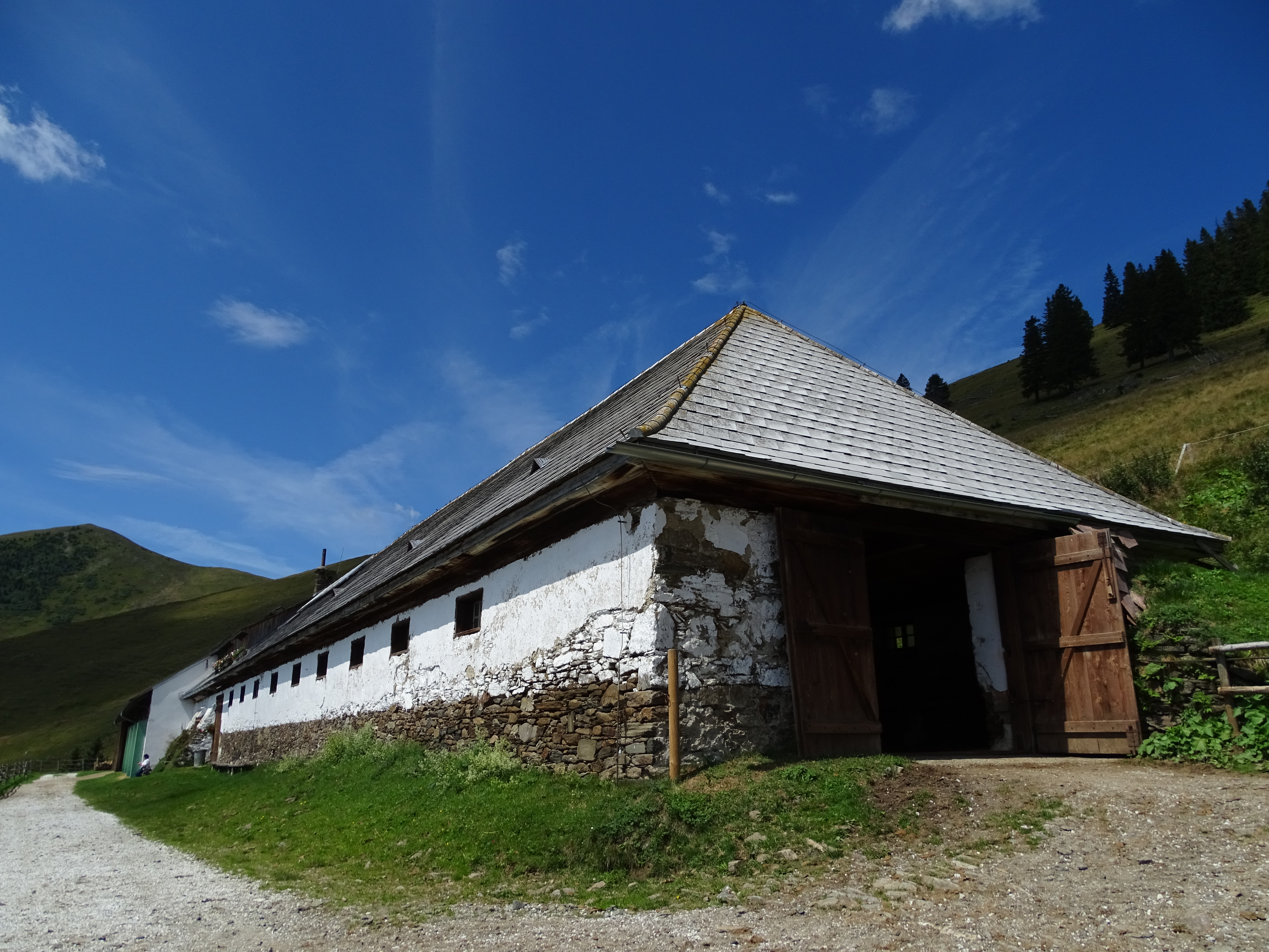 Der Brendlstall auf der Gleinalpe. Er dient als eine der Sommerweiden für die Lippizaner